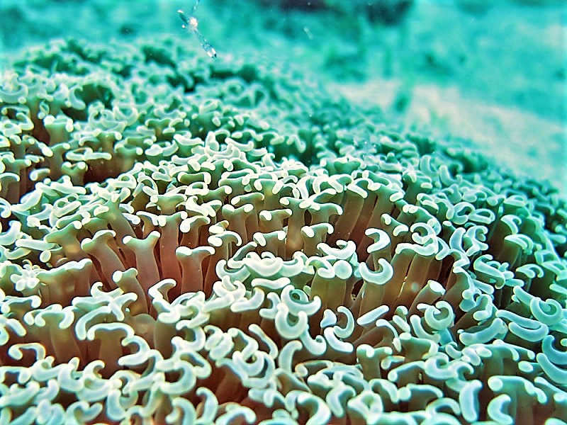 Colonia de coral Euphyllia ancora, isla Lizard, Australia